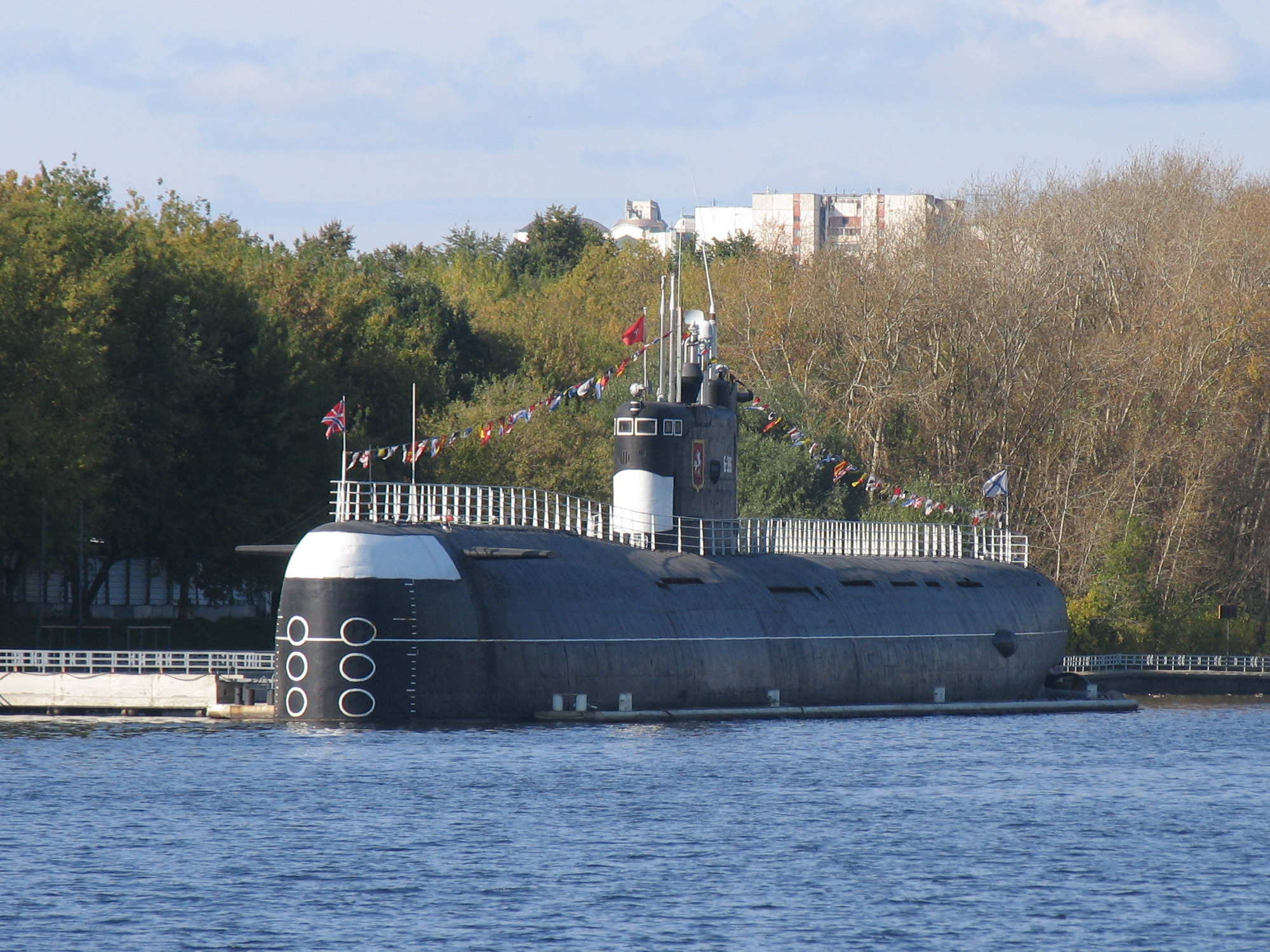 Подводная лодка Б-396 "Новосибирский комсомолец" проекта 641Б "Сом"